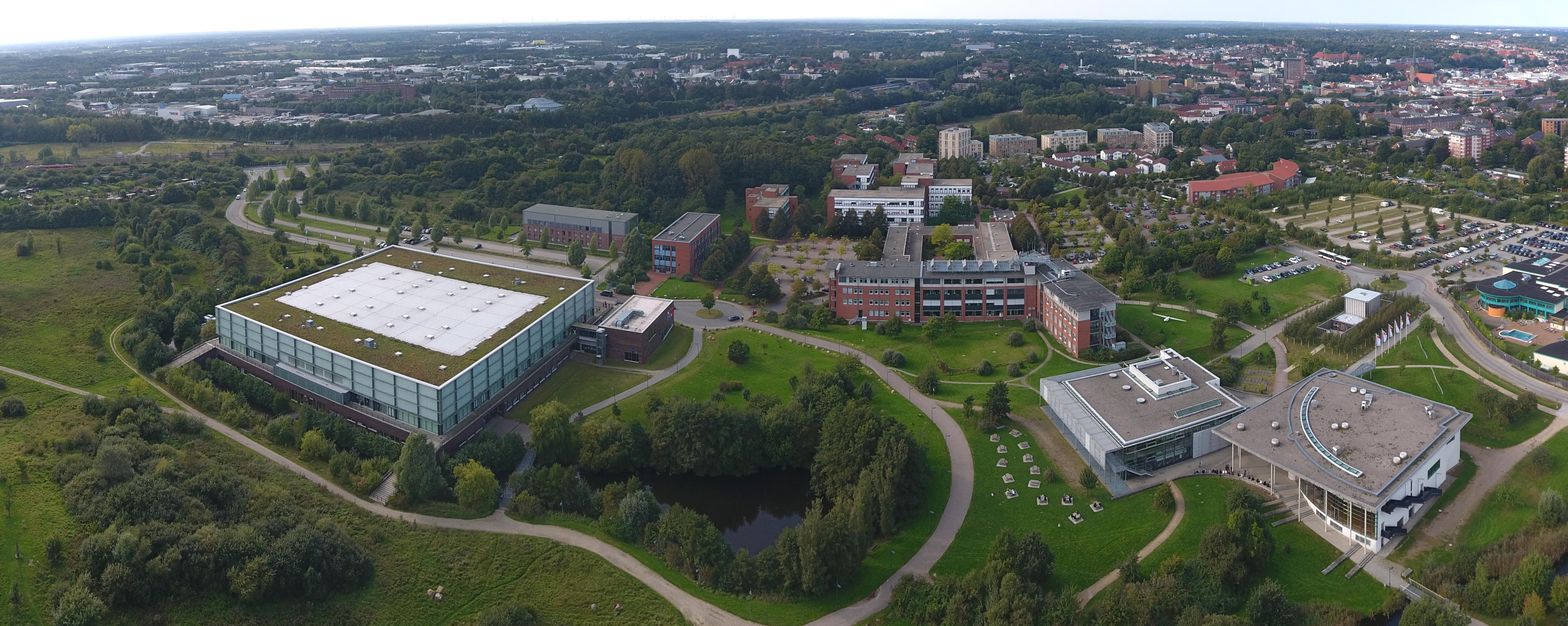 Panorama der FlensArena und der Hochschule Flensburg